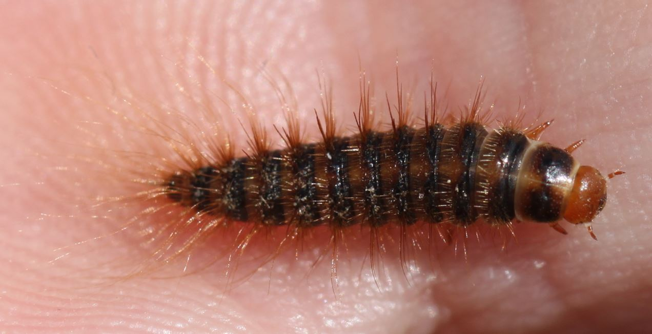 12 mm lange Käferlarve aus der Familie Dermestidae, möglicherweise Dermestes laniarius, am 16. Juli 2018 in Walldorf/Baden